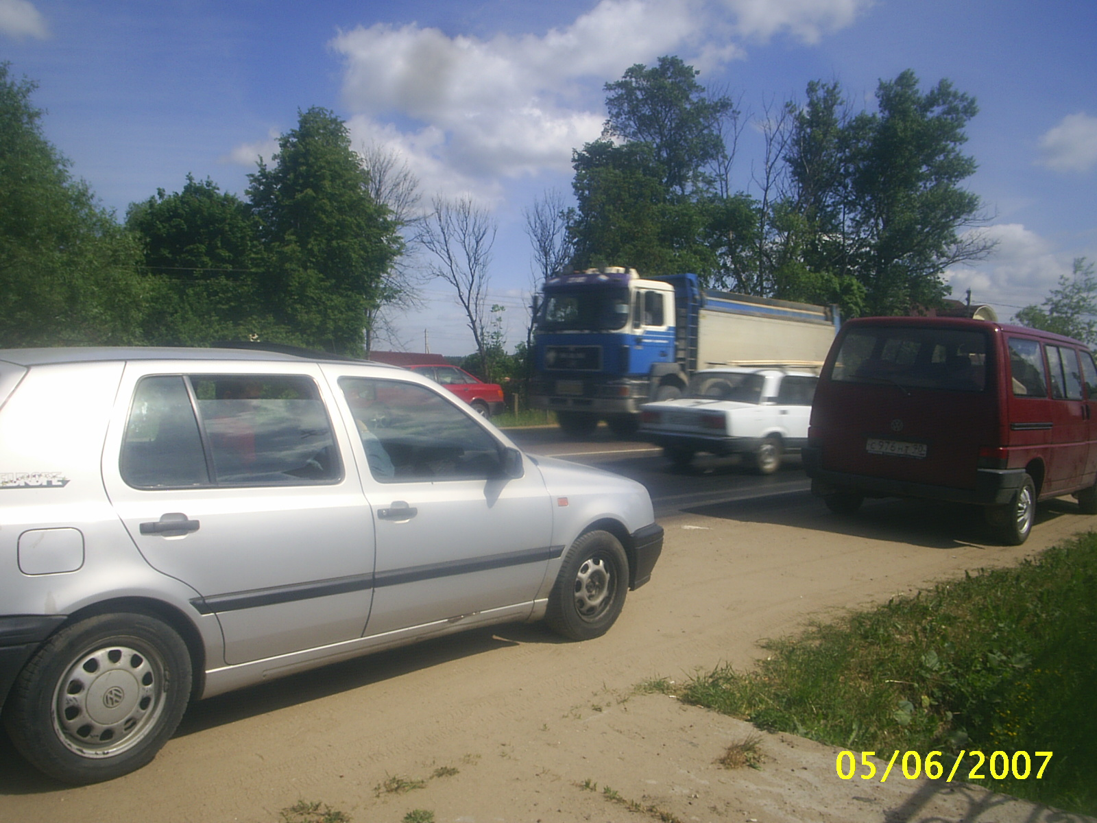 Можайское шоссе в Кубинке